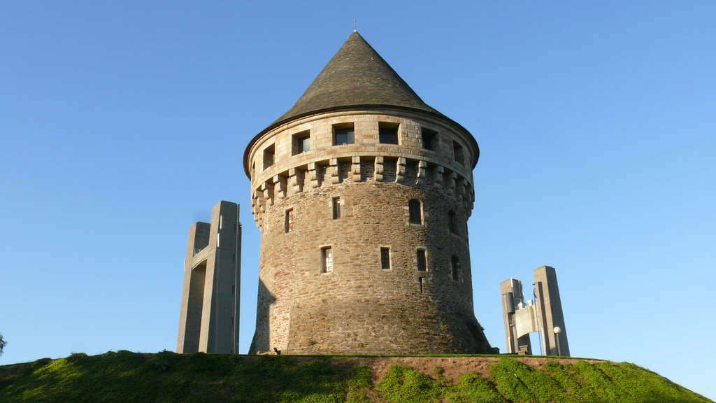 Brest